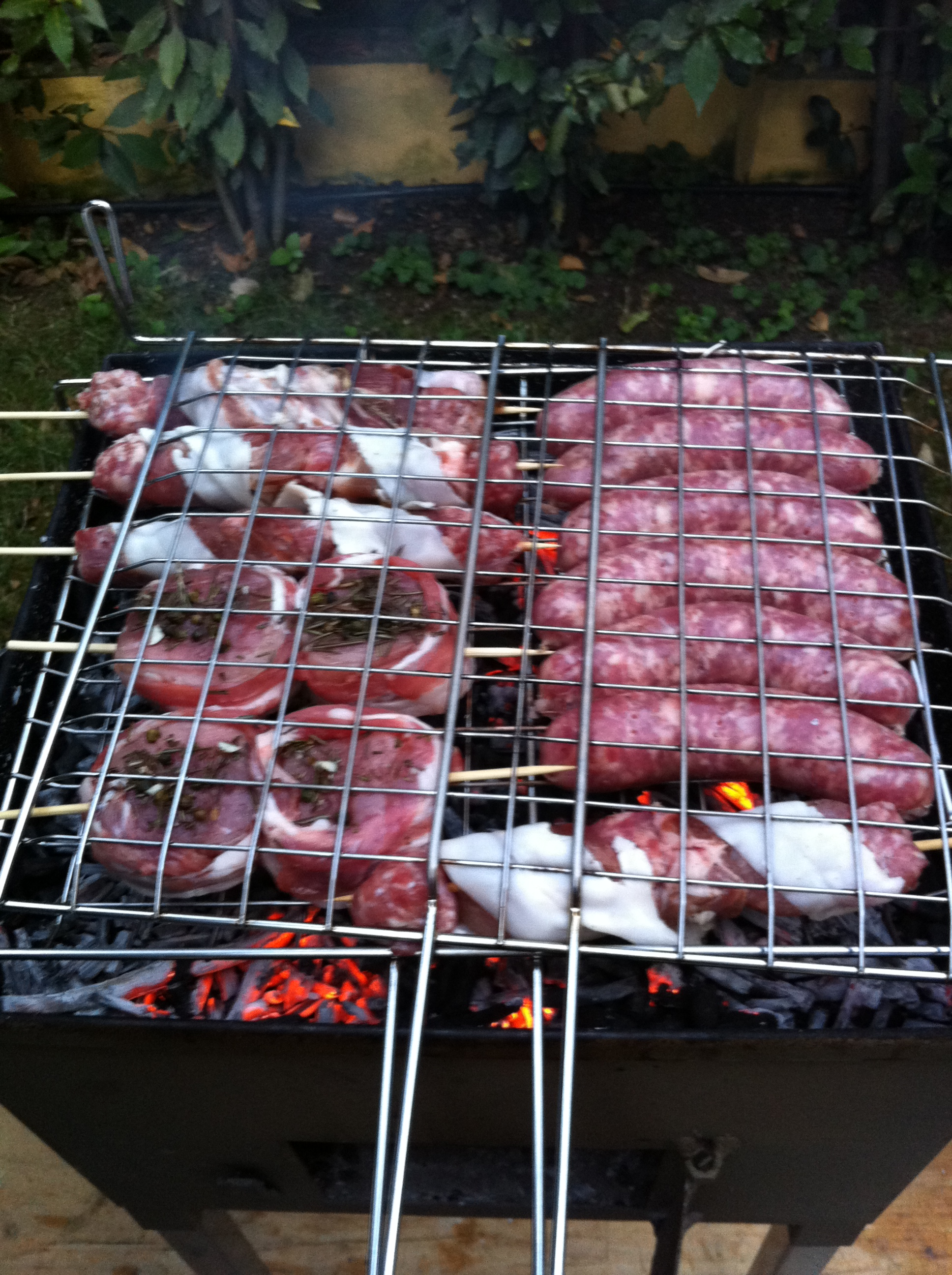 Barbecue appena allestito, con carne ancora cruda